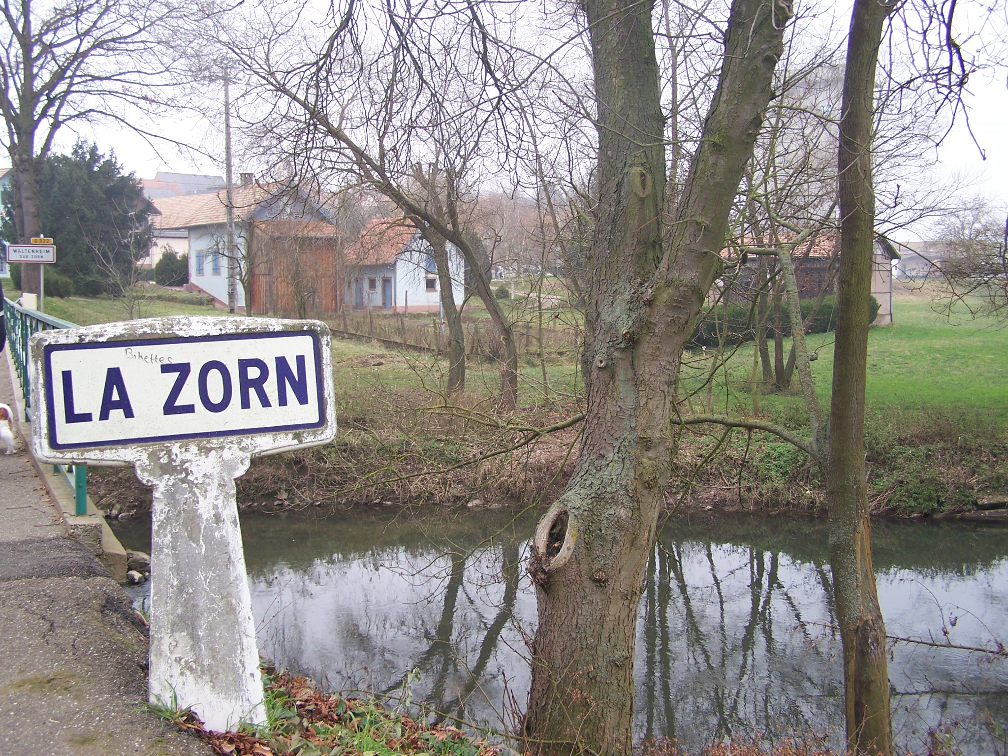 La rivière alsacienne Zorn, prise à l'entrée de Waltenheim-sur-Zorn le 28 décembre 2006. Photo personnelle.